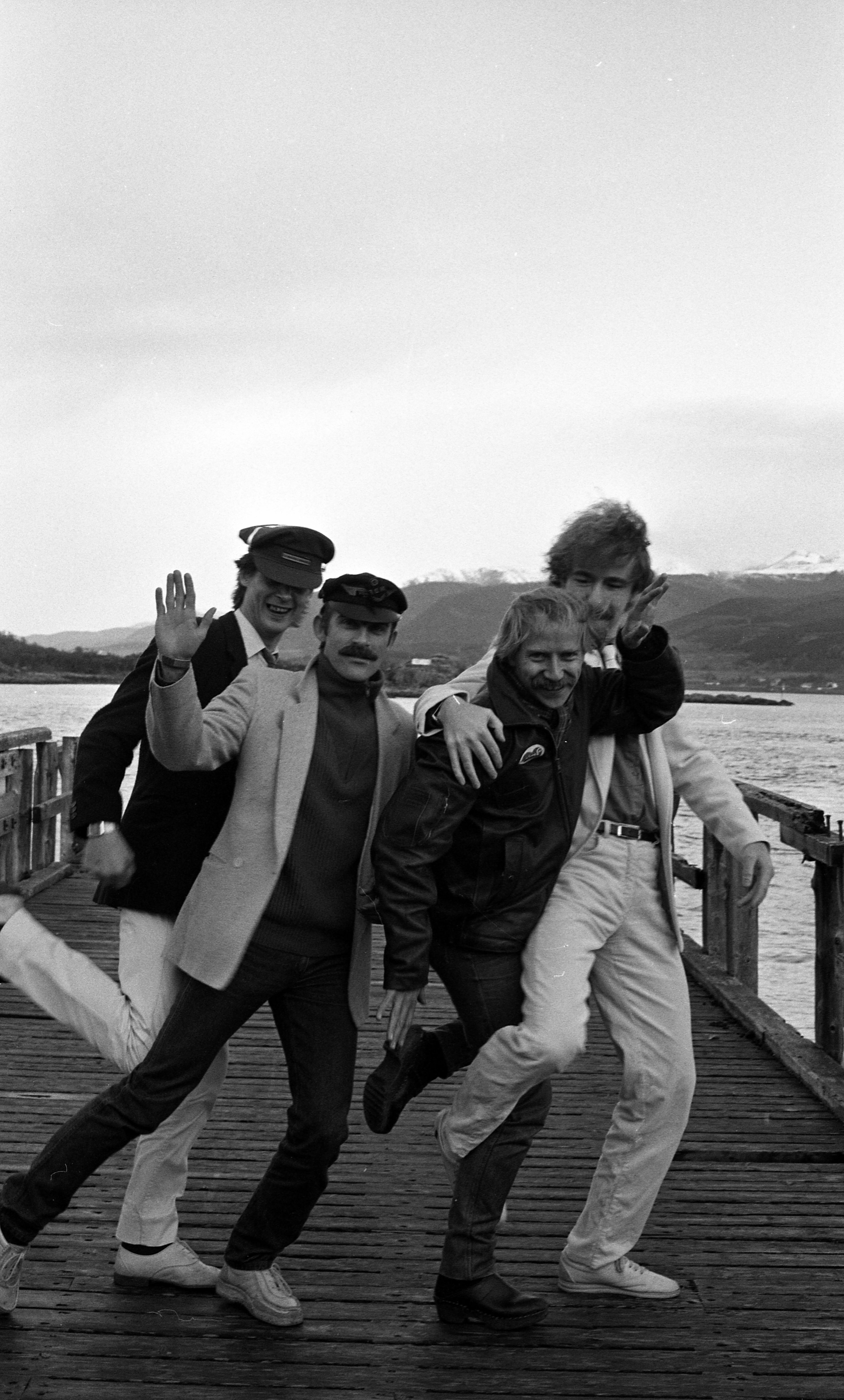 1983. Foto: Beate Holm Svenning. Arkivref.: PA-0797_U_11490_001_022